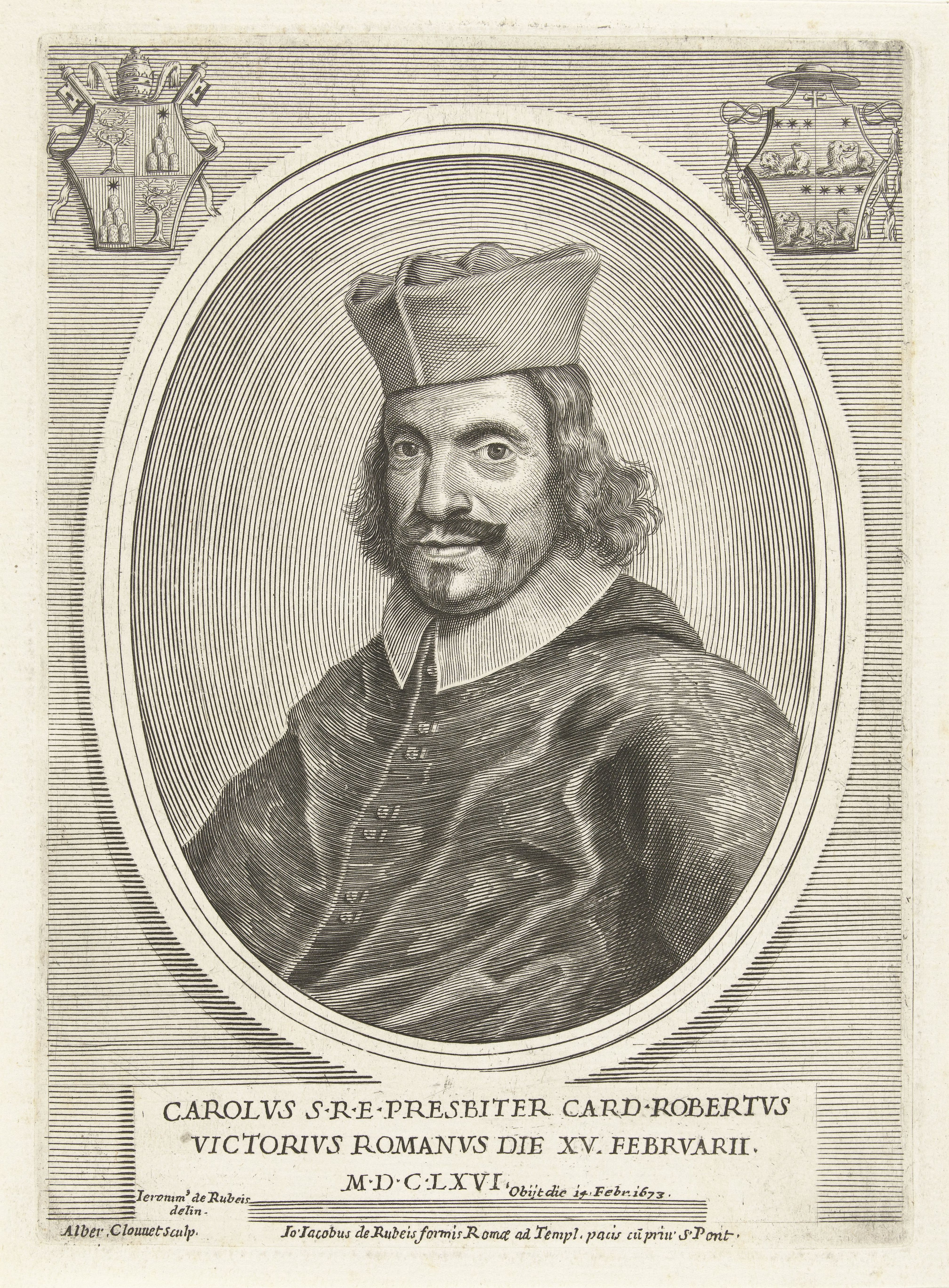 Cardinal Carlo Roberti de' Vittori (1605-1673)